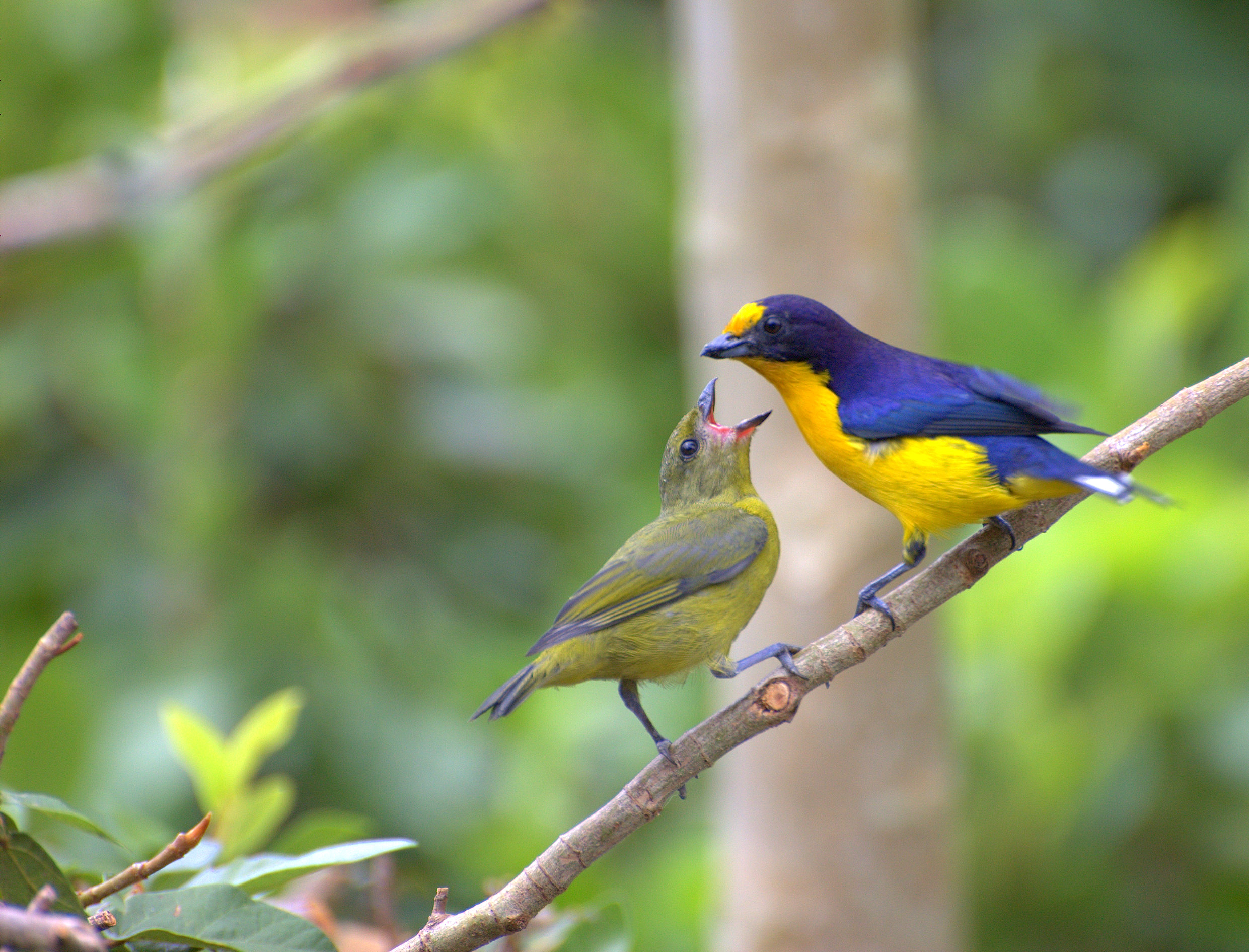 Registro-SP - Vale do Ribeira